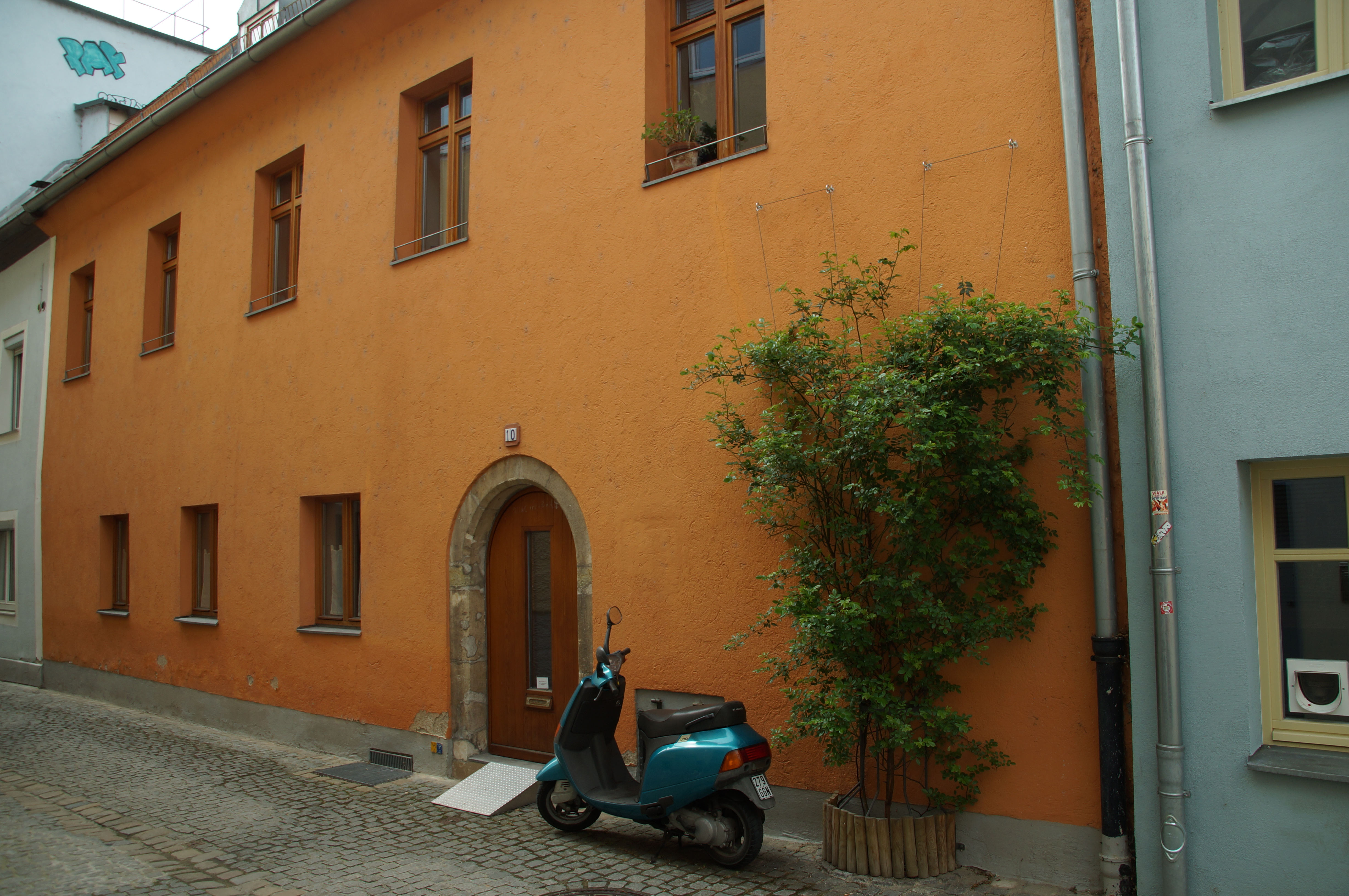 Wohnhaus, zweigeschossiger und traufständiger Satteldachbau, 18. Jahrhundert, Umbauten 2. Hälfte 19. Jahrhundert This is a photograph of an architectural monument.